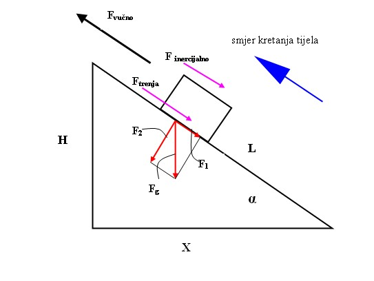 Gibanje predmeta uz kosinu